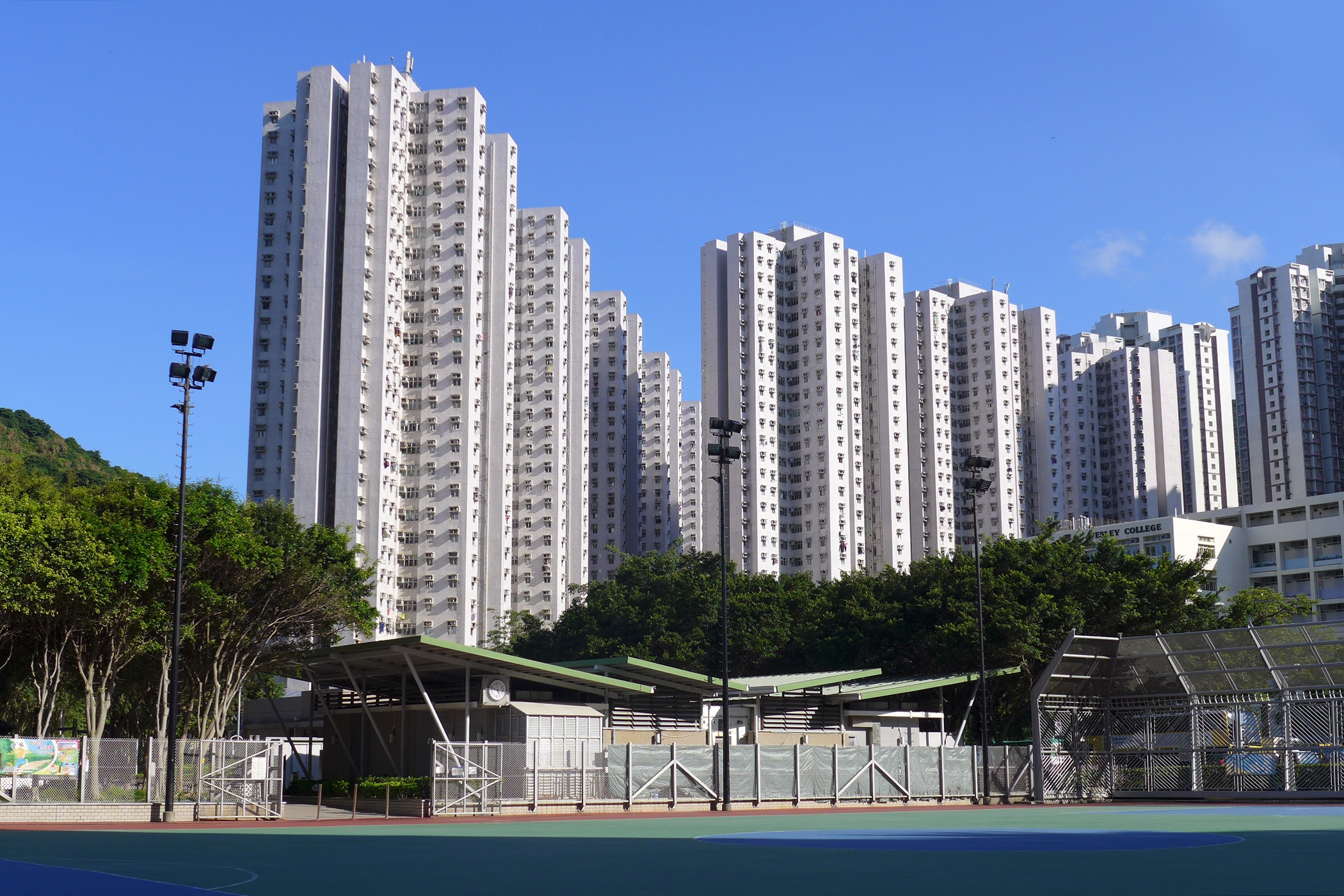 Fullview Garden